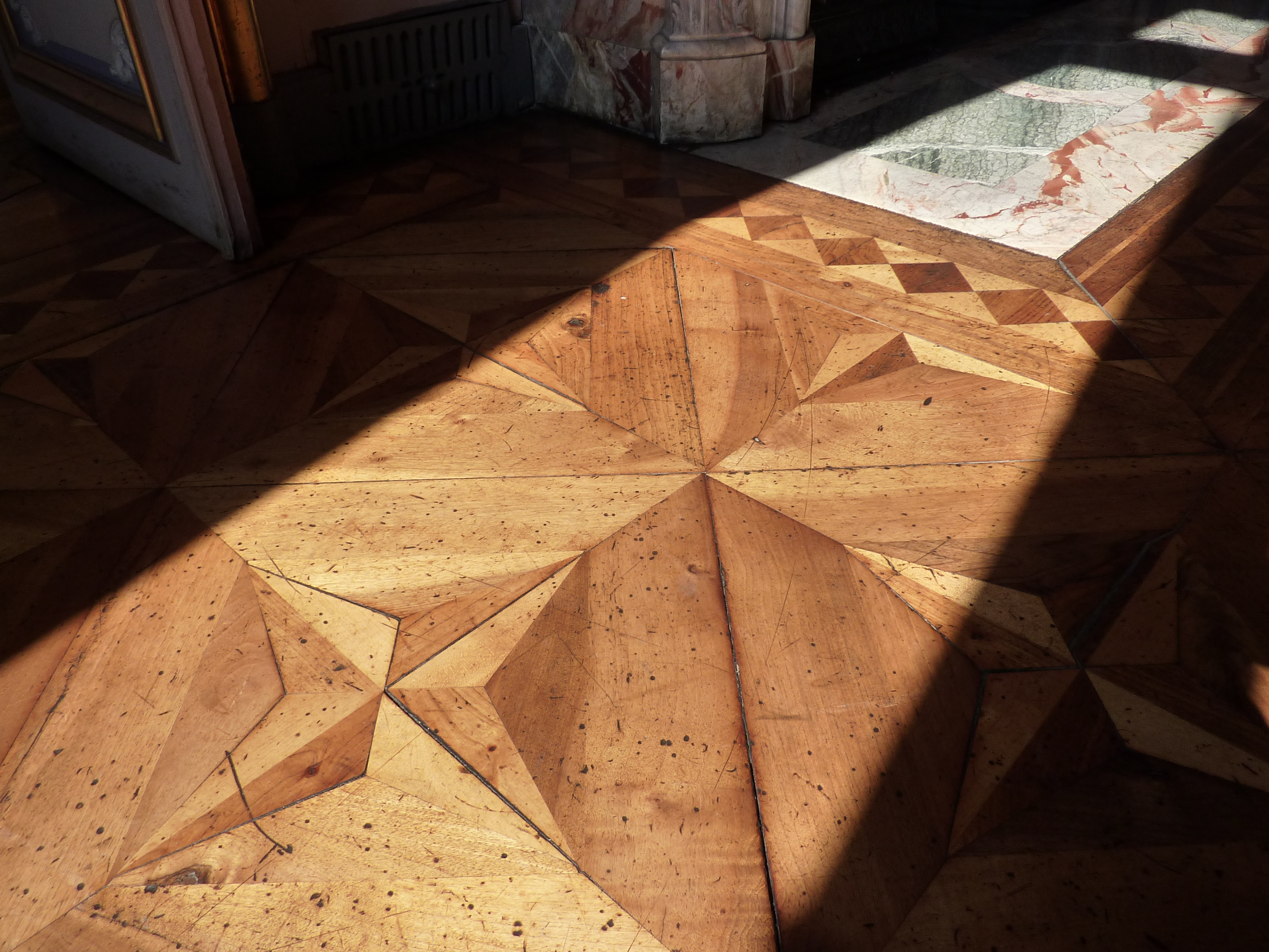 Hôtel des troupes de montagne, place de Verdun, Grenoble, France. Parquet du grand salon rose.